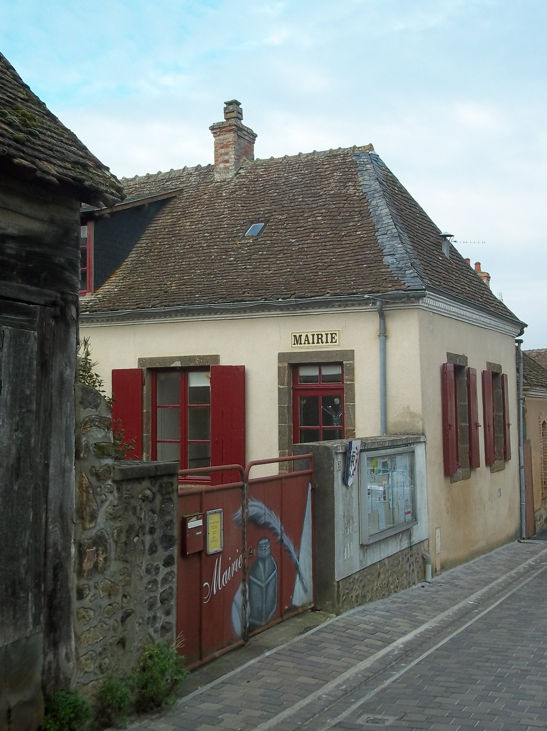 Mairie